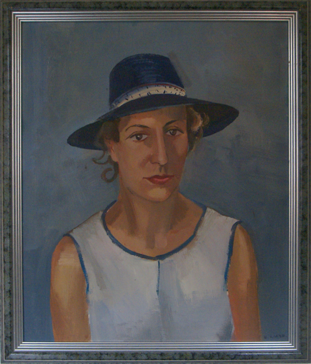 Portrait of the painter Clélie Lamberty by Robert Liard (1977), (private collection of C. Lamberty)Portrait du peintre Clélie Lamberty par Robert Liard durant un voyage aux Indes en 1977Retrat de la pintora Clélie Lamberty per Robert Liard durant un viatge a Índia al 1977Portret van de kunstschilder Clélie Lamberty door Robert Liard